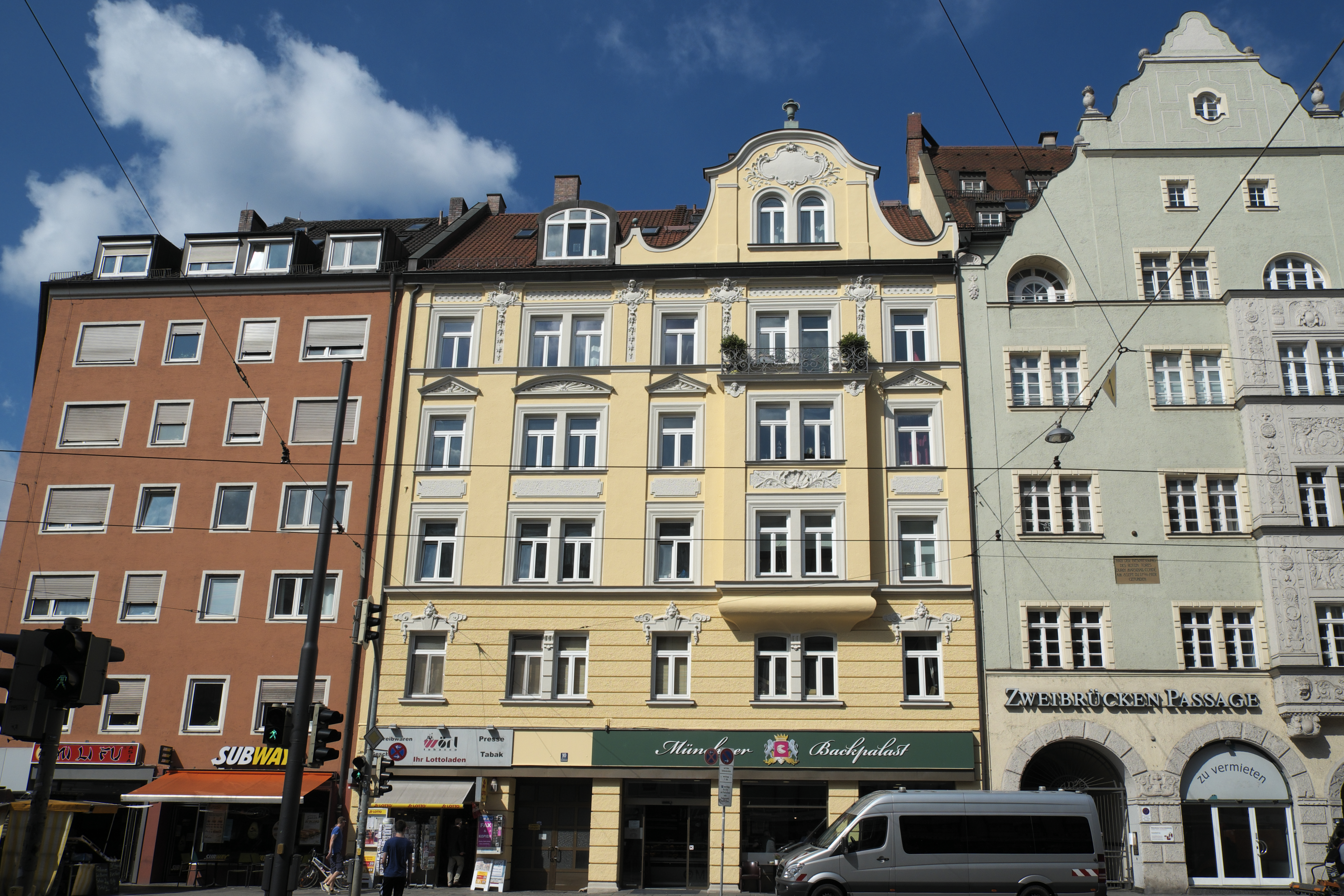 Mietshaus in der Zweibrückenstraße 10 in der Isarvorstadt im Stadtbezirk Ludwigsvorstadt-Isarvorstadt in München (Bayern/Deutschland), 1892–93 von Hugo Dreier gebaut